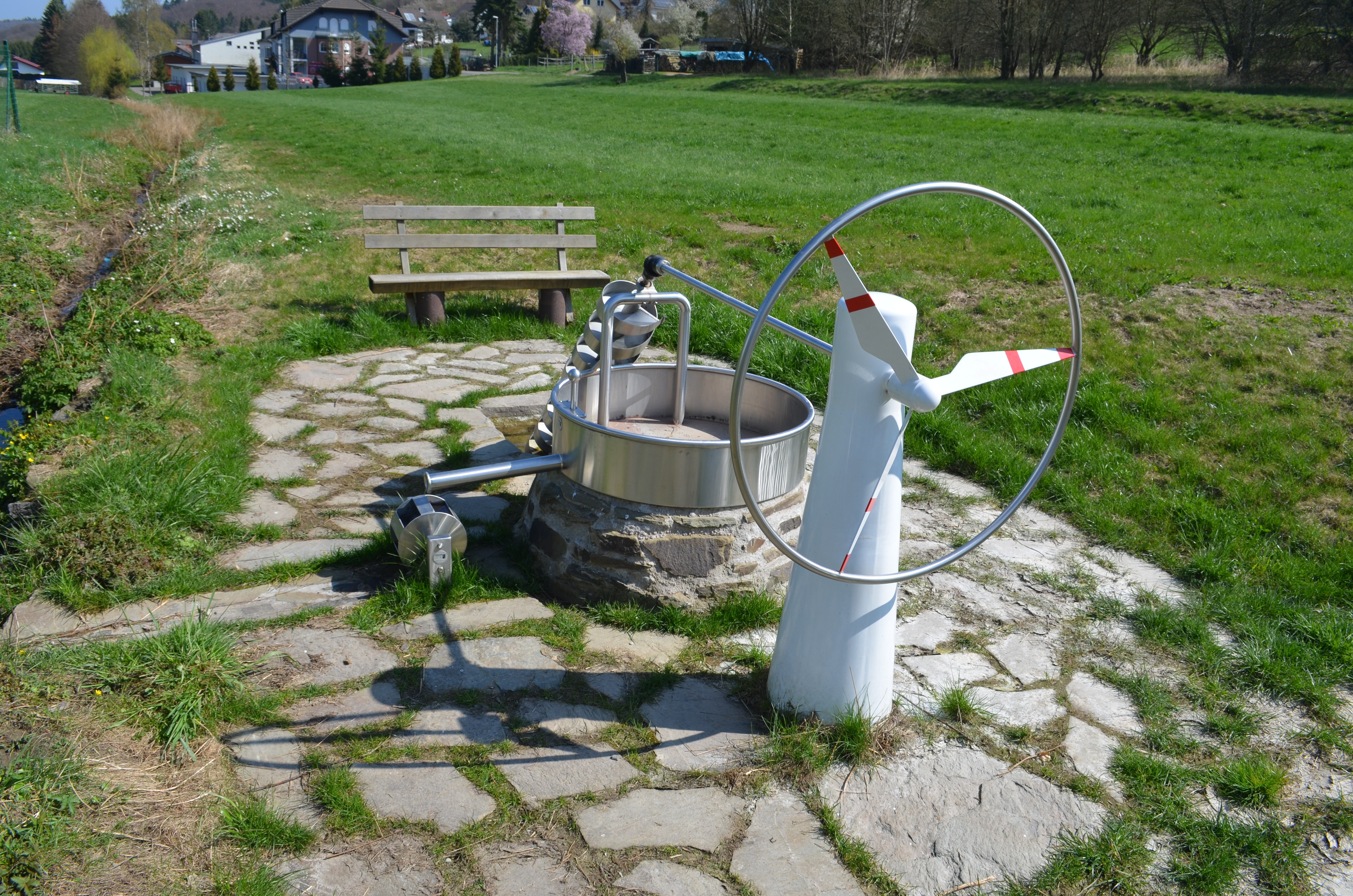 Modell Pumpspeicherkraftwerk bei Cratzenbach. Teil des „Energie-Erlebnis-Pfad“ im "Windpark" Weilrod